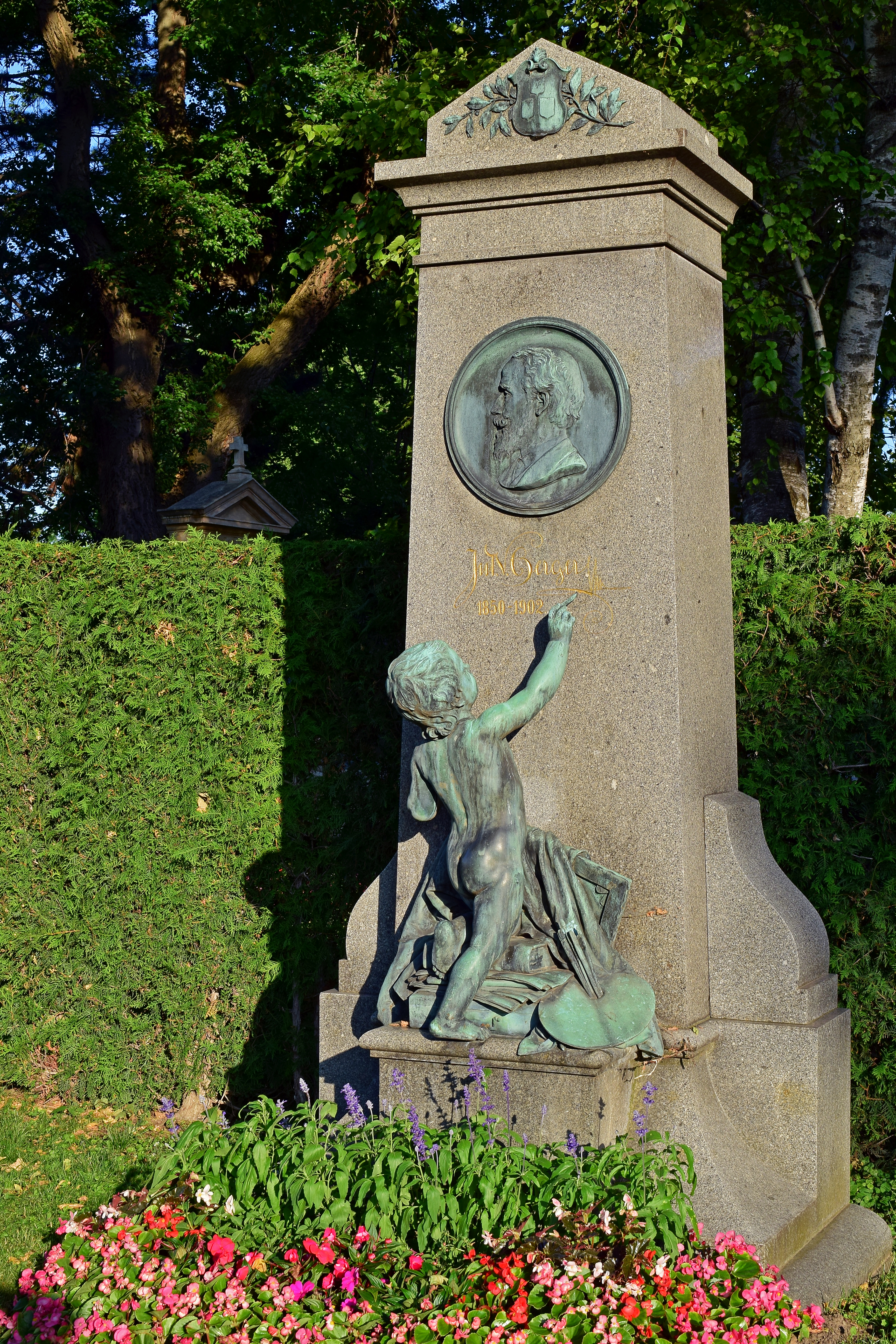 Ehrengrab von Julius Victor Berger auf dem Wiener Zentralfriedhof, geschaffen von Edmund Hofmann von Aspernburg. }